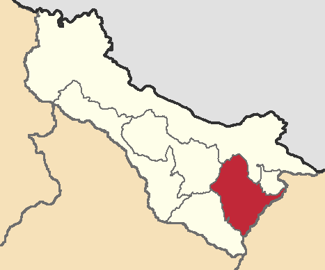 Mapa localizacor del cantón Bolívar, Carchi, Ecuador